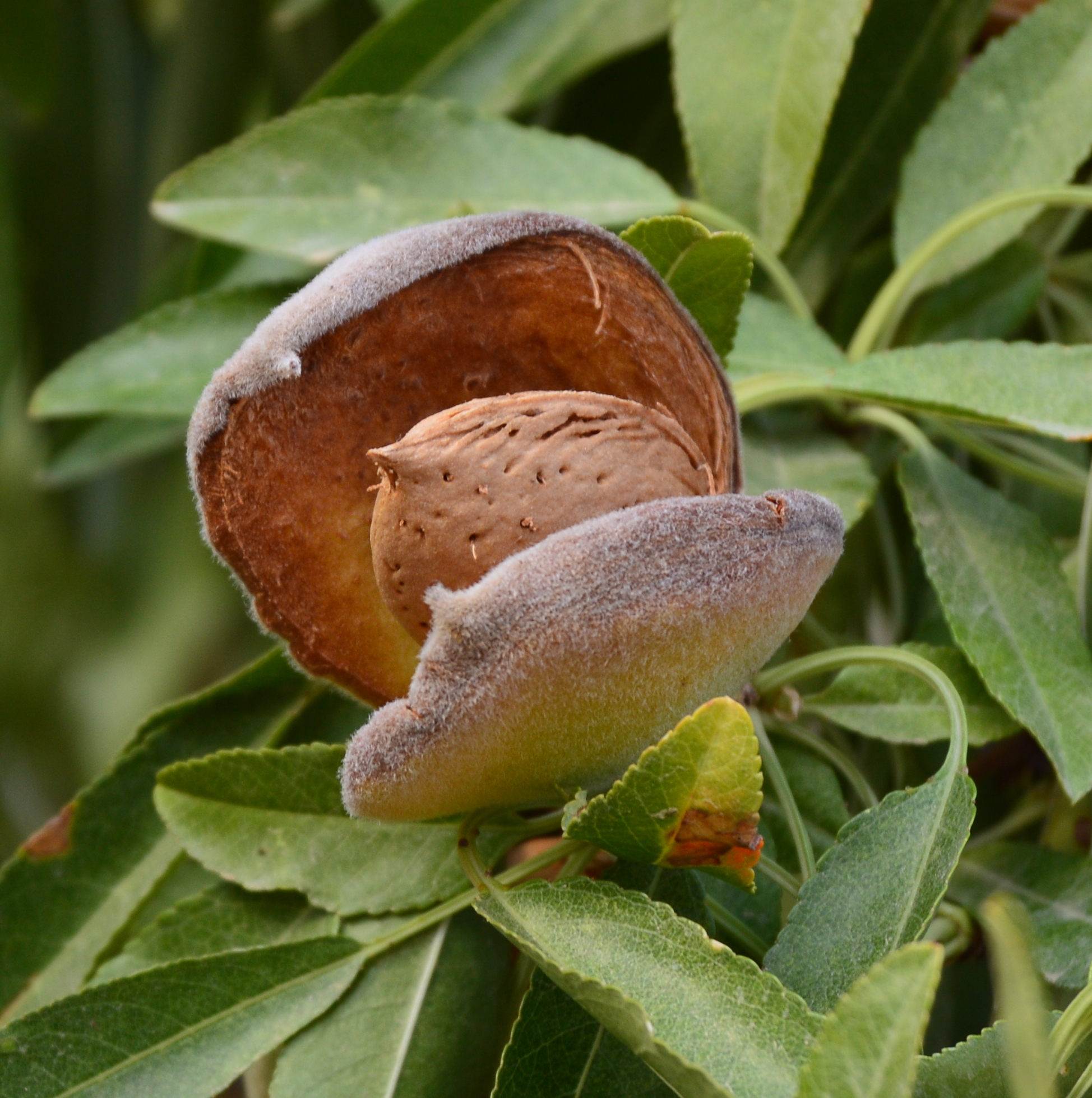 Almendros en Madrigueras